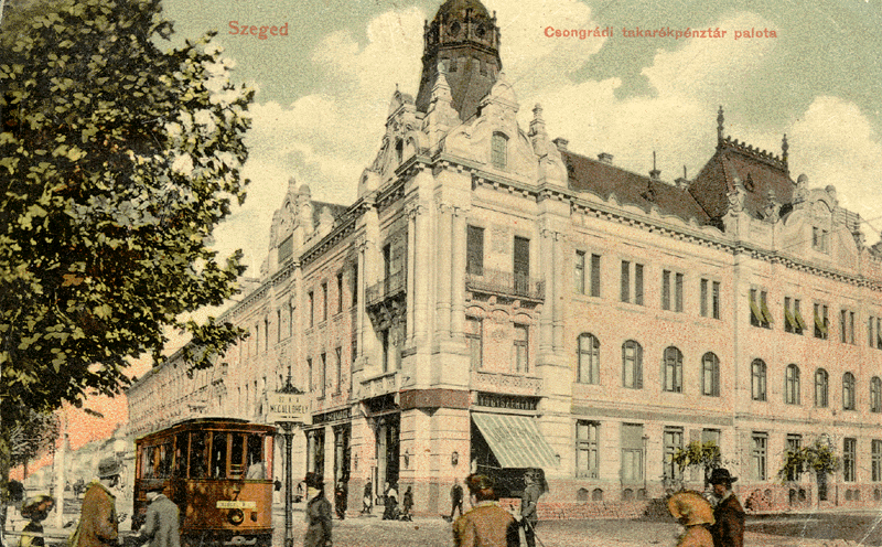 Szeged-Csongrádi Takarékpénztár 1910 körül